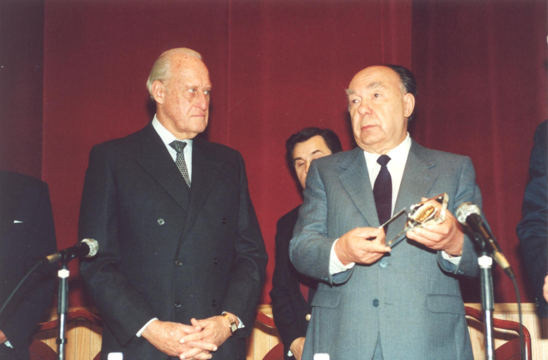 Международная Леонардо-премия